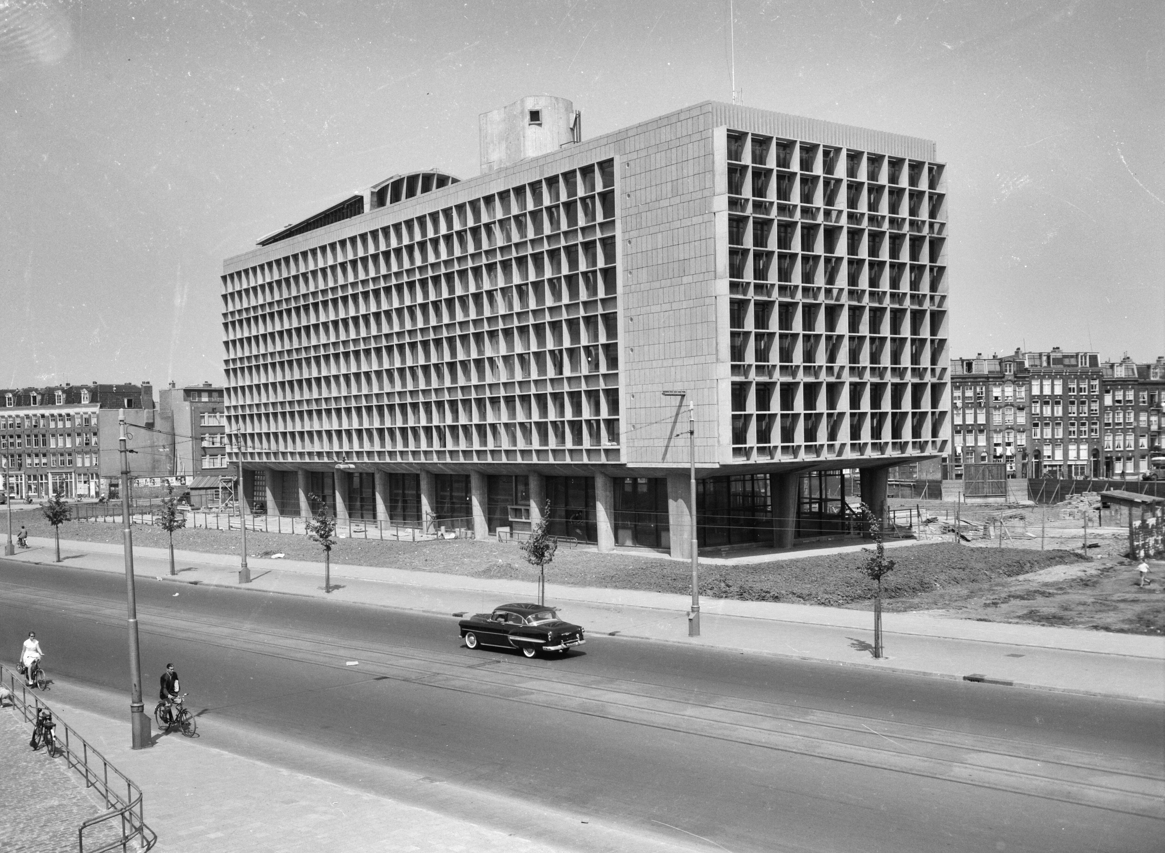 Collectie / Archief : Fotocollectie Anefo Reportage / Serie : [ onbekend ] Beschrijving : Aanbouw ambachtschool Wibautstraat Datum : 29 mei 1956 Trefwoorden : AMBACHTSCHOLEN, aanbouw Fotograaf : Bilsen, Joop van / Anefo Auteursrechthebbende : Nationaal Archief Materiaalsoort : Negatief (zwart/wit) Nummer archiefinventaris : bekijk toegang 2.24.01.04 Bestanddeelnummer : 907-7856 Reacties Geplaatst door Maaike op 07 oktober 2012 - 13:31. Instellingsnamen: Eerste Christelijke Technische School Patrimonium. Trefwoorden: scholen; ambachtsschool; technische school architecten: De Geus & Ingwersen